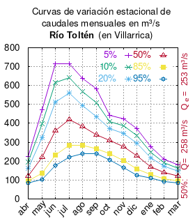 Curvas de variación estacional del río Toltén en Villarrica. # Dirección General de Aguas # Diagnóstico y clasificación de los cursos y cuerpos de agua según objetivos de calidad. Cuenca del río Toltén. # Santiago de Chile # Ministerio de Obras Públicas (Chile) # 2004 # url: # urlarchivo: # Tabla 4.7: Río Toltén en Villarrica (m3/s) , pág.47 mes 5% 10% 20% 50% 85% 95% abr 225.64 194.02 163.65 123.36 94.43 83.99 may 471.06 398.07 324.64 219.86 136.04 102.61 jun 716.38 616.69 513.82 361.13 231.62 177.13 jul 716.26 643.23 560.38 421.08 283.86 219.68 ago 639.48 568.60 494.70 383.09 283.95 238.96 sep 582.81 508.71 436.57 338.76 266.25 239.30 oct 442.84 410.58 373.75 309.65 240.85 205.05 nov 423.14 387.16 346.55 277.12 204.54 167.67 dic 370.74 335.93 296.00 228.03 159.68 126.96 ene 275.83 246.52 215.97 169.83 128.84 110.24 feb 208.66 190.98 171.55 139.75 108.56 93.60 mar 180.58 163.81 146.34 119.94 96.50 85.86 This plot was created with Gnuplot.